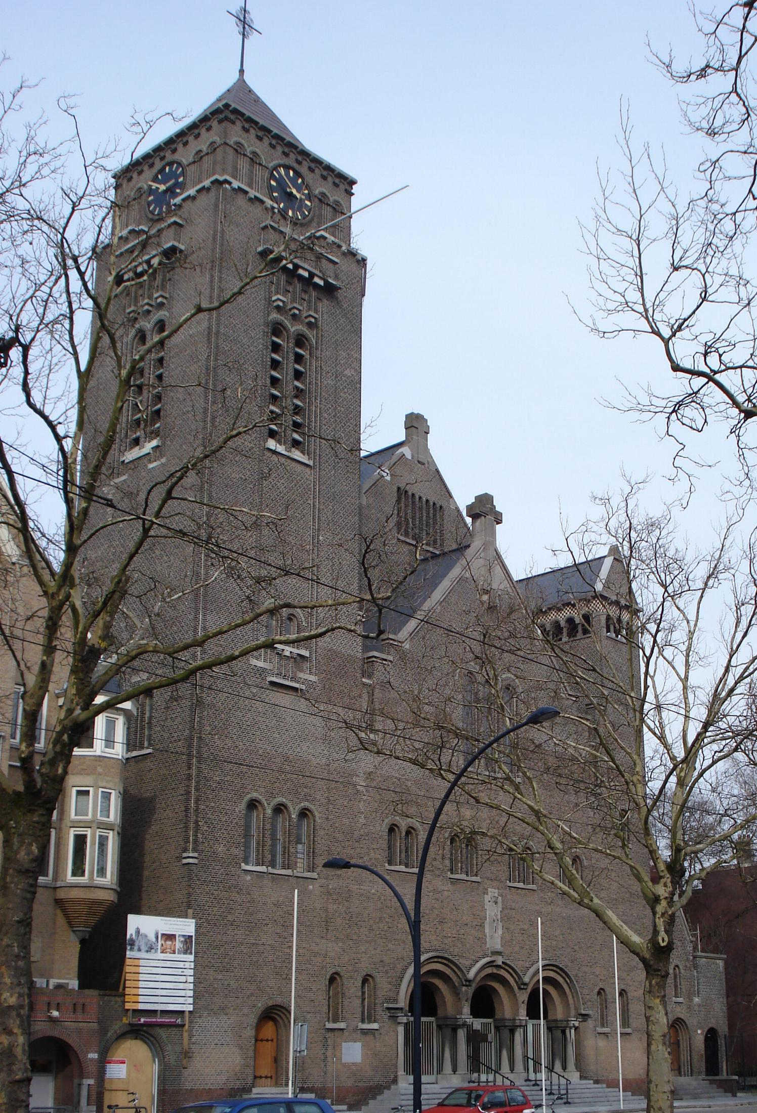 Rotterdam, Mathenesserlaan, Laurentius en Elisabeth kathedraal. Rijksmonument.